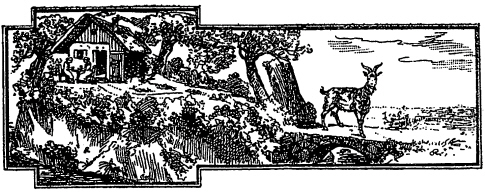 Erzgebirgische Dorfgeschichten